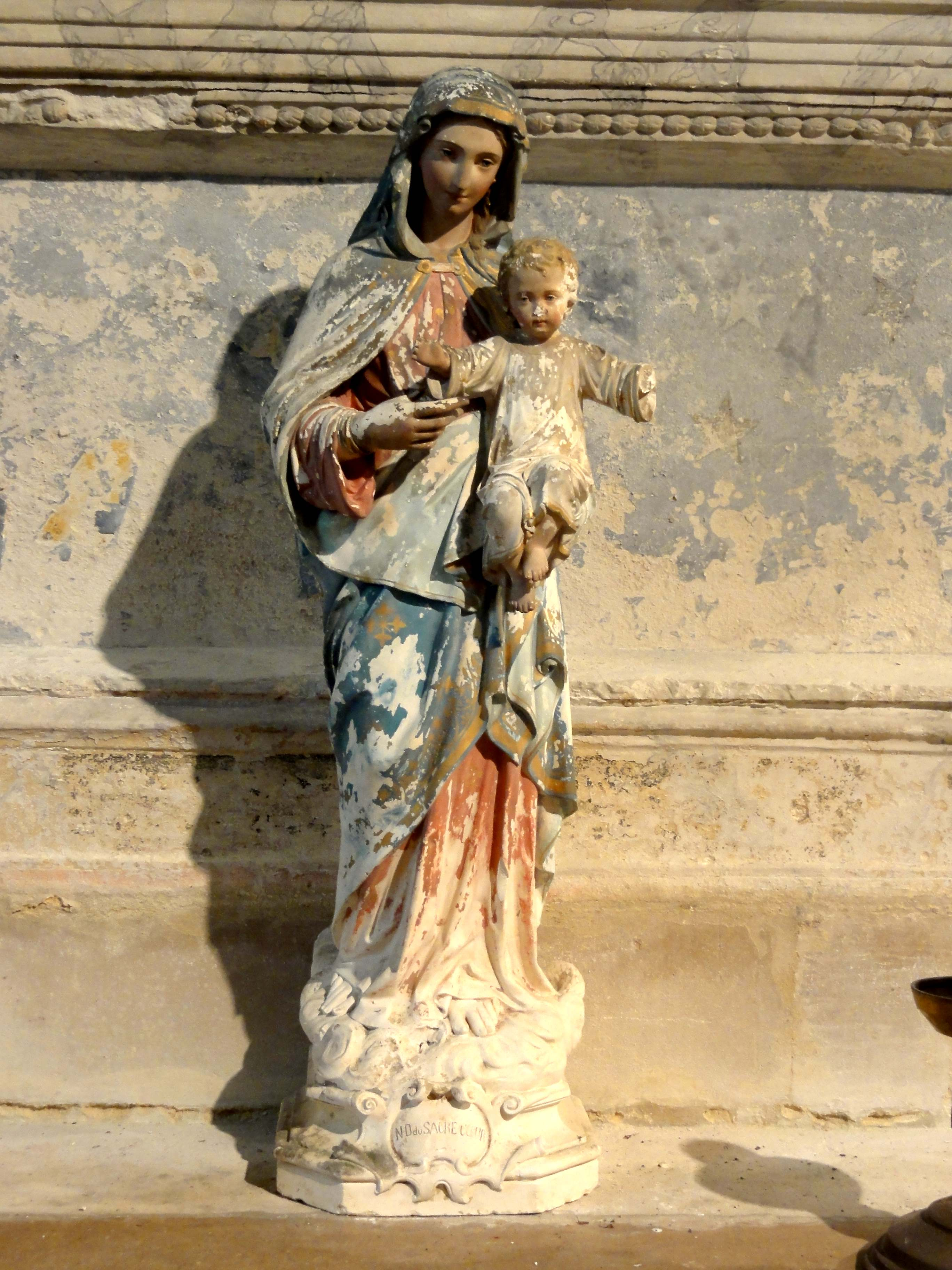 Mobilier de l'église - voir titre.